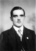 František Bardon, český hermetik a mág